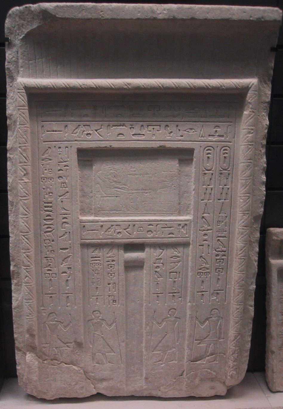 cropped image of Image:Louvres-antiquites-egyptiennes-img 2947.jpg licensed under CC-BY-SA 2.0 France